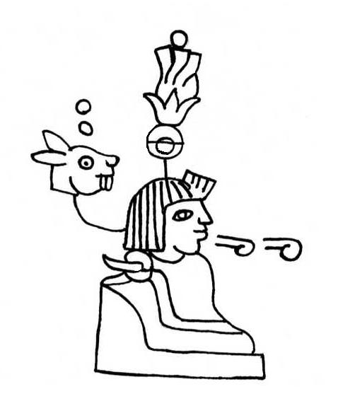 Imagen reprografiada del Códice Xolotl, lámina 8. Que representa a Ixtlilxochitl sentado en un trono (icpalli) y con su nombre pictográfico representado por una flor sobre un ojo y con la fecha dos-conejo.